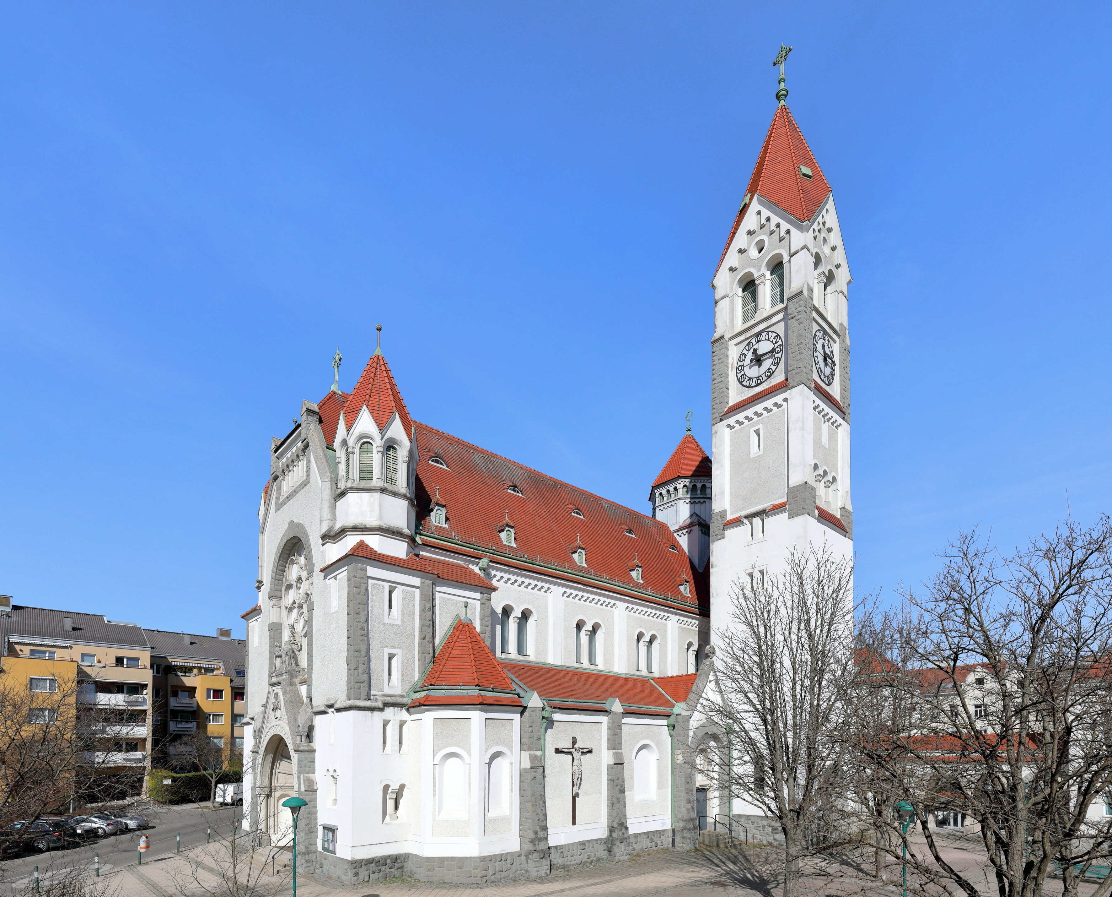 Südansicht der Rosenkranzkirche in Hetzendorf, ein Bezirksteil des 12. Gemeindebezirks Meidling in der österreichischen Bundeshauptstadt Wien.Die Kirche im neuromanischen Stil (mit Jugendstilelementen) wurde von 1908 bis 1909 nach Plänen von Hubert Gangl und Eugen Felgel errichtet. Die Grundsteinlegung erfolgte am 4. Juni 1908 und die Weihe auf "Heilige Maria, Königin des Hochheiligen Rosenkranzes" am 2. Oktober 1909 durch Weihbischof Godfried Marschall, unter Beisein des Kaisers Franz Joseph. Am 17. Oktober 1944 wurde die Kirche durch eine Bombe teilweise zerstört und nach dem Krieg (1953) wieder instandgesetzt.